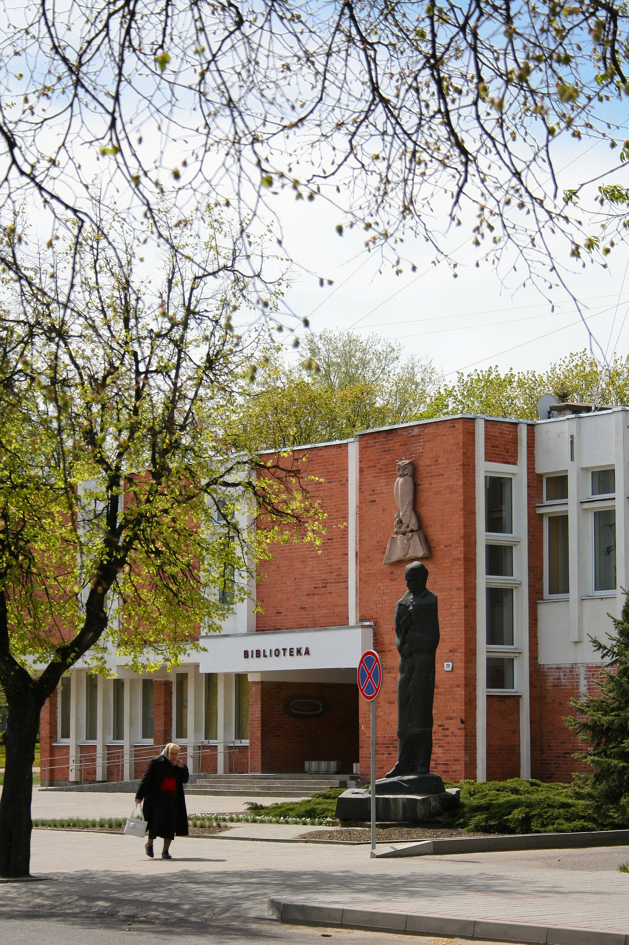 Marijampolė city center